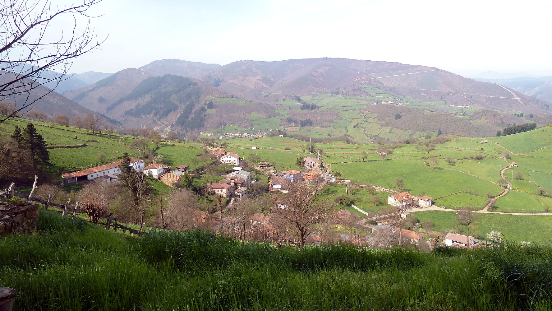 Pueblo de Merillés en el concejo de Tineo (Asturias)